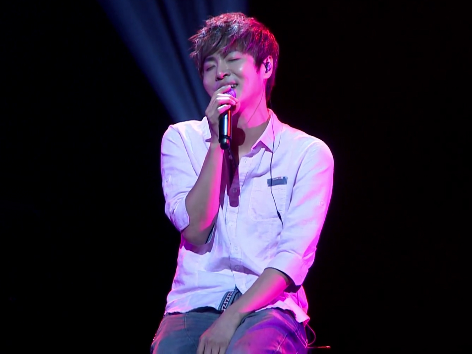 [TV텐] 정동하 수원 콘서트 비하인드